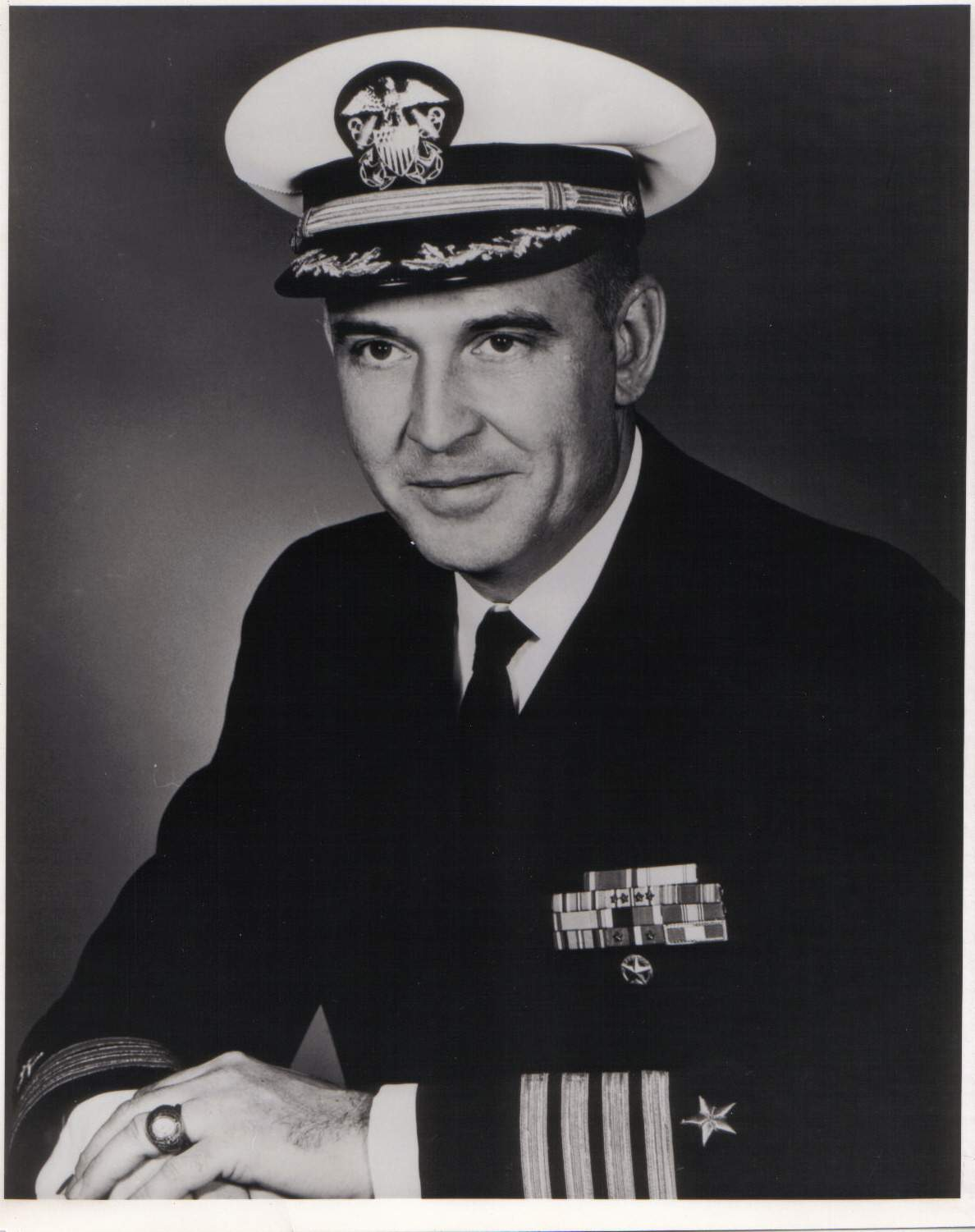 Captain J. Edward Snyder